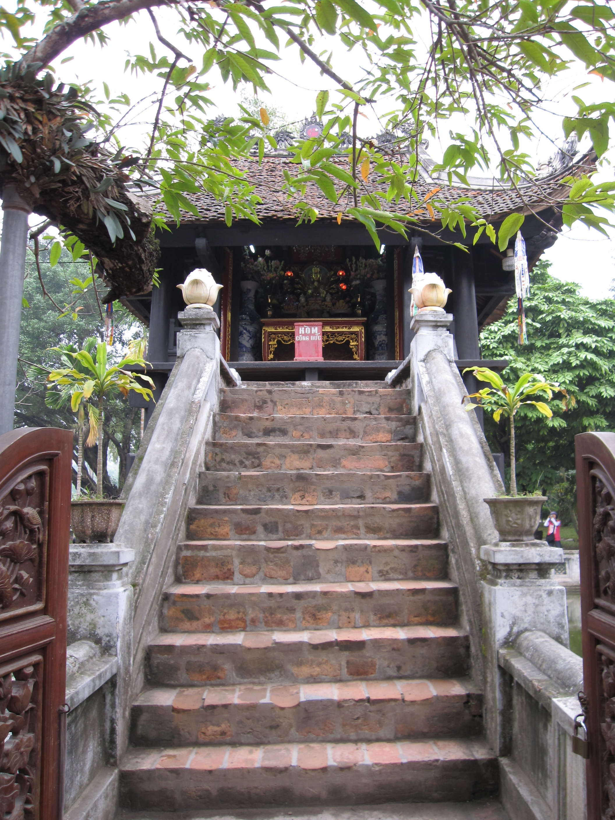 One Pillar Pagoda